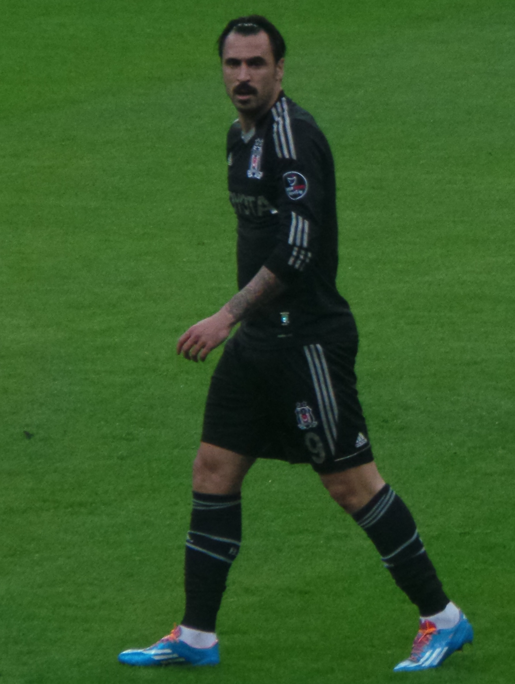 Hugo Almeida'14